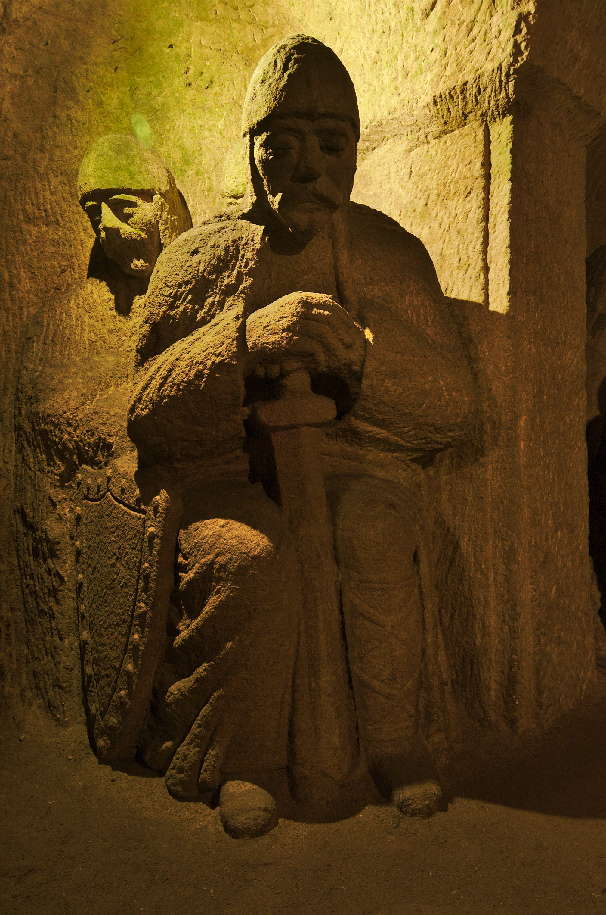 Jeskyně Blanických rytířů, Kunštát, okres Blansko